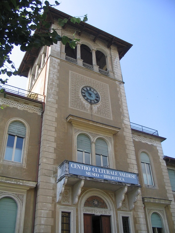 Centrum kultury waldensów w Torre Pellice (Piemont, Włochy)